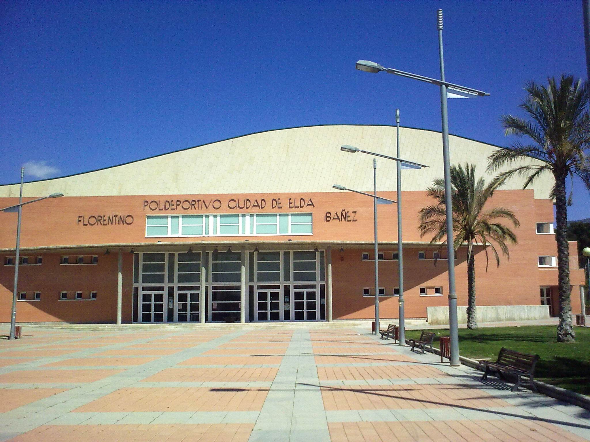 Fachada del Pabellón Polideportivo Ciudad de Elda